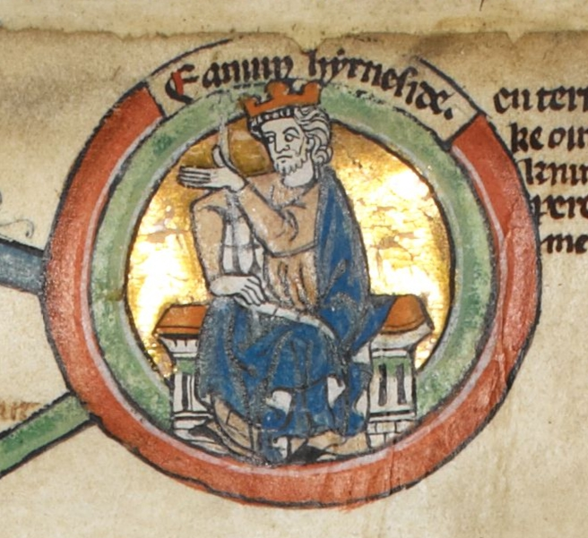 Miniature d'Edmond Côte-de-Fer dans une généalogie royale du XIVe siècle.